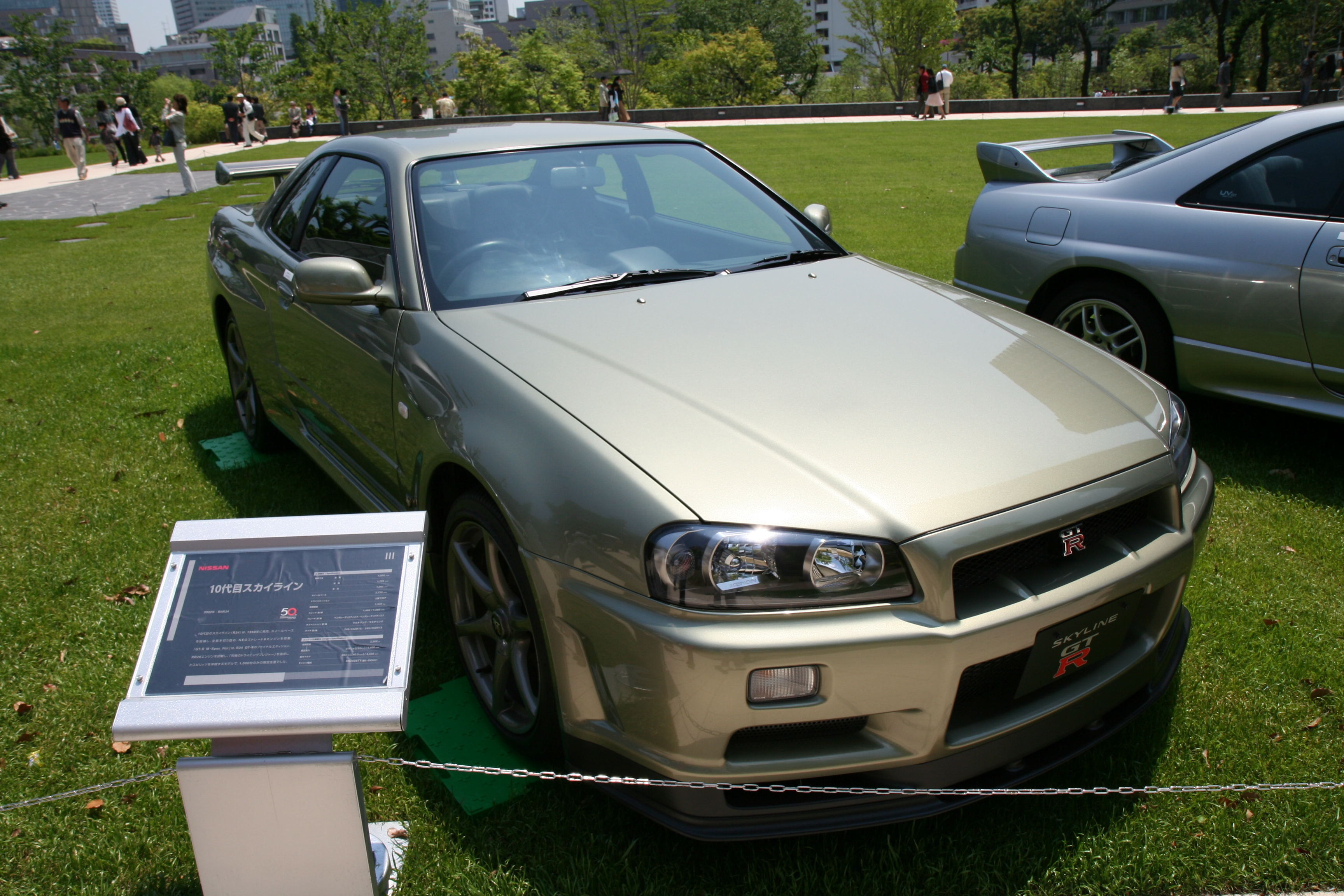 日産・スカイラインGTR 10代目(R34系)。